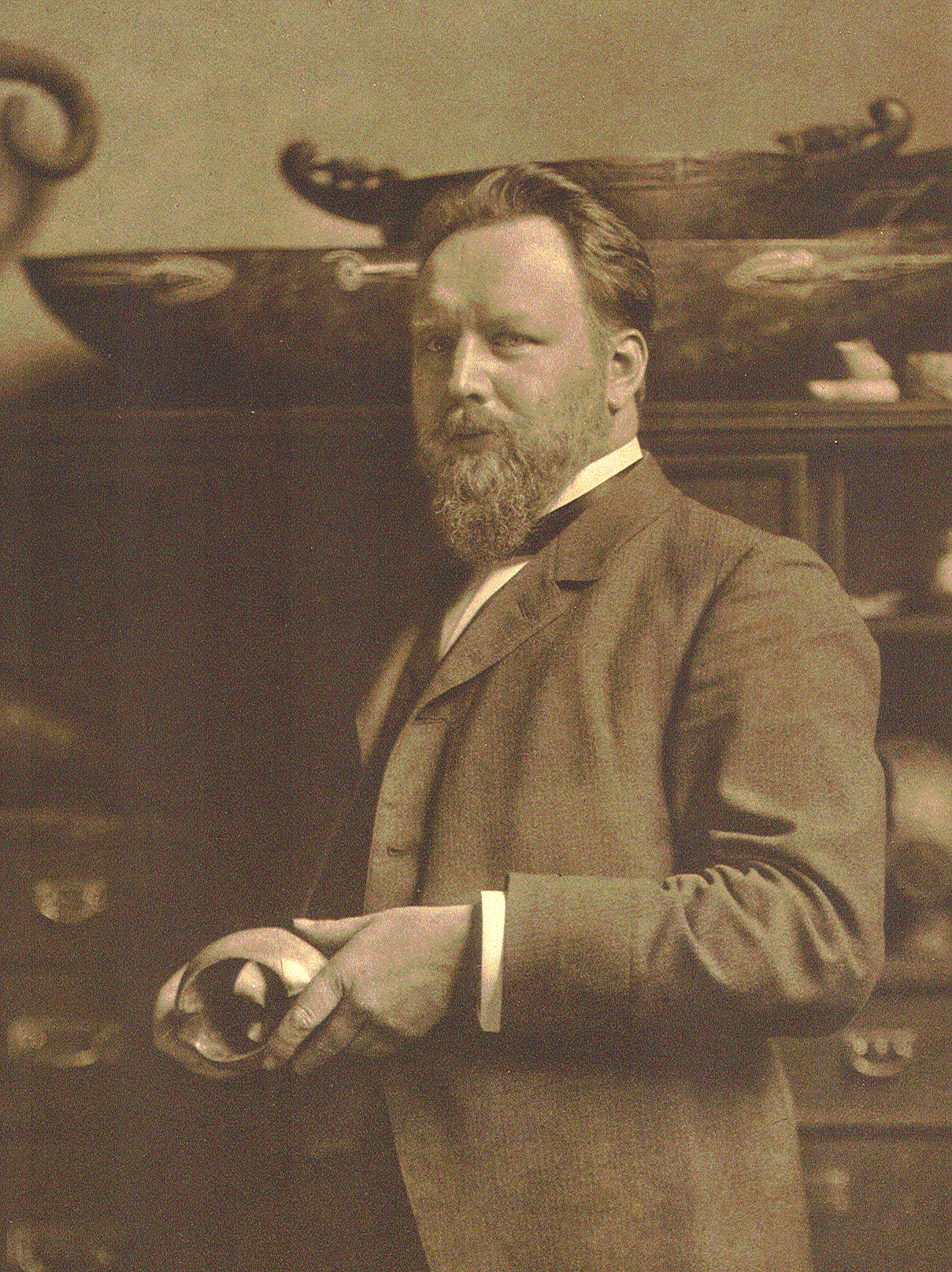 Georg Christian Thilenius (1868–1937), Professor, Direktor des Hamburger Museums für Völkerkunde